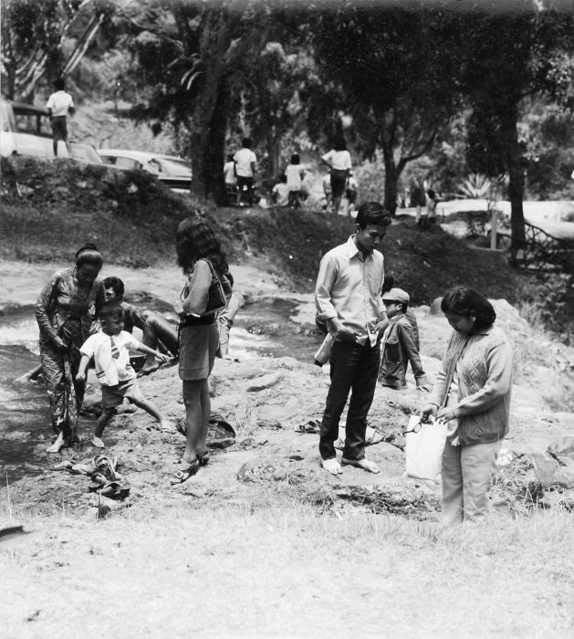 Negatief. Mensen tijdens een dagje uit in het recreatieoord Maribaja